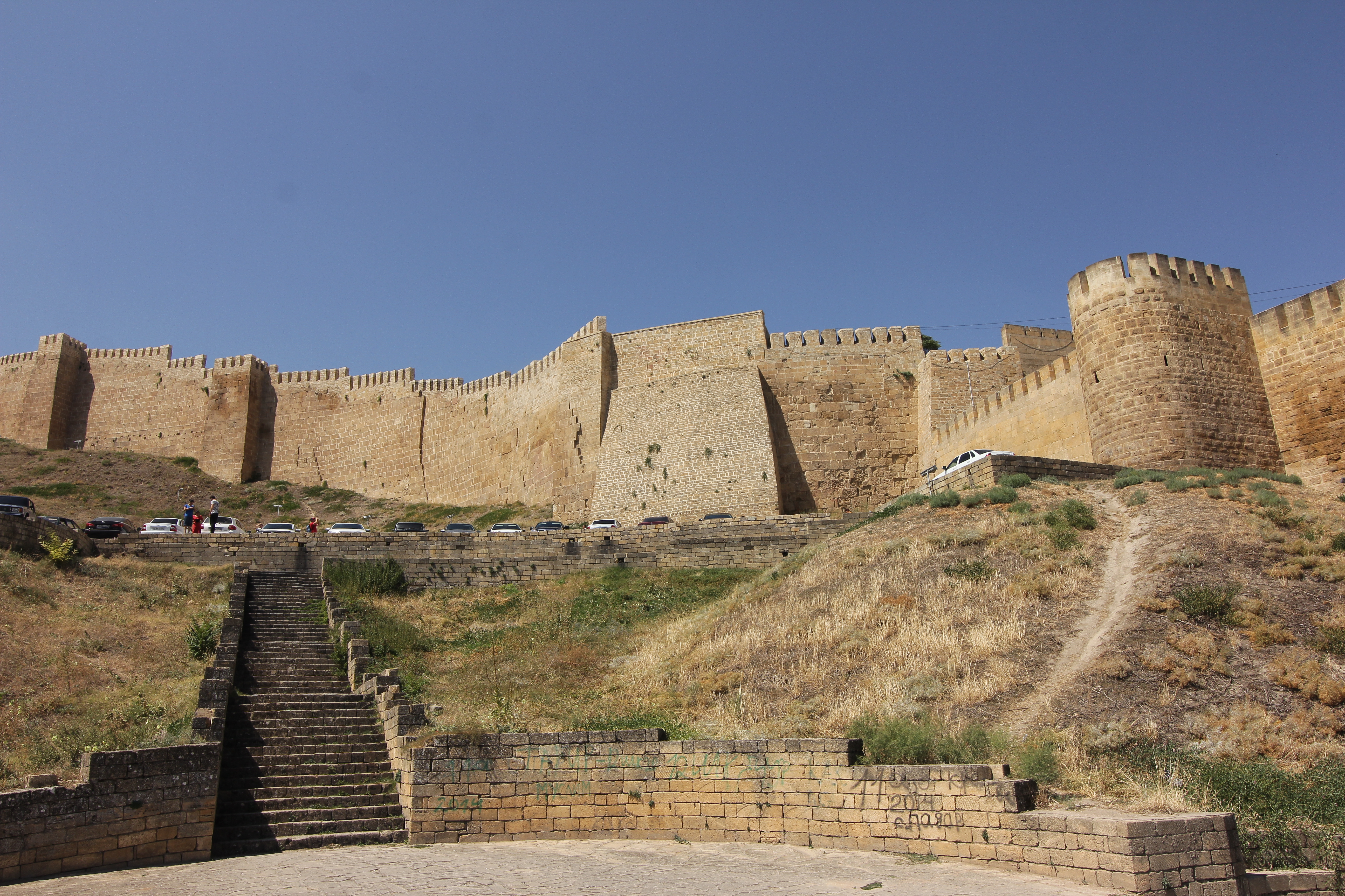 Дербентская цитадель "Нарын-Кала" и древние сооружения внутри цитадели: Дербент, Дагестан